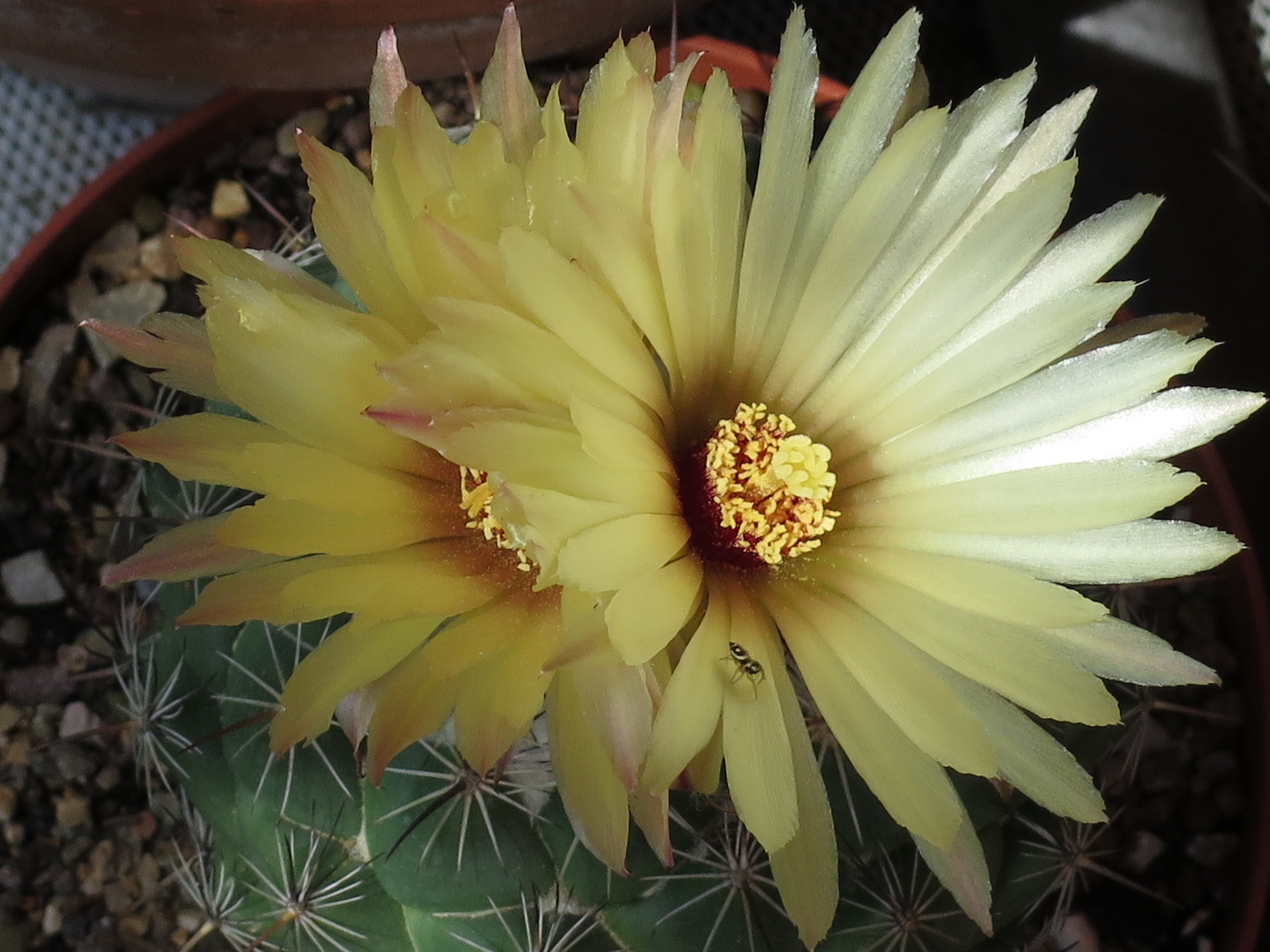 I fiori della coryphantha delicata